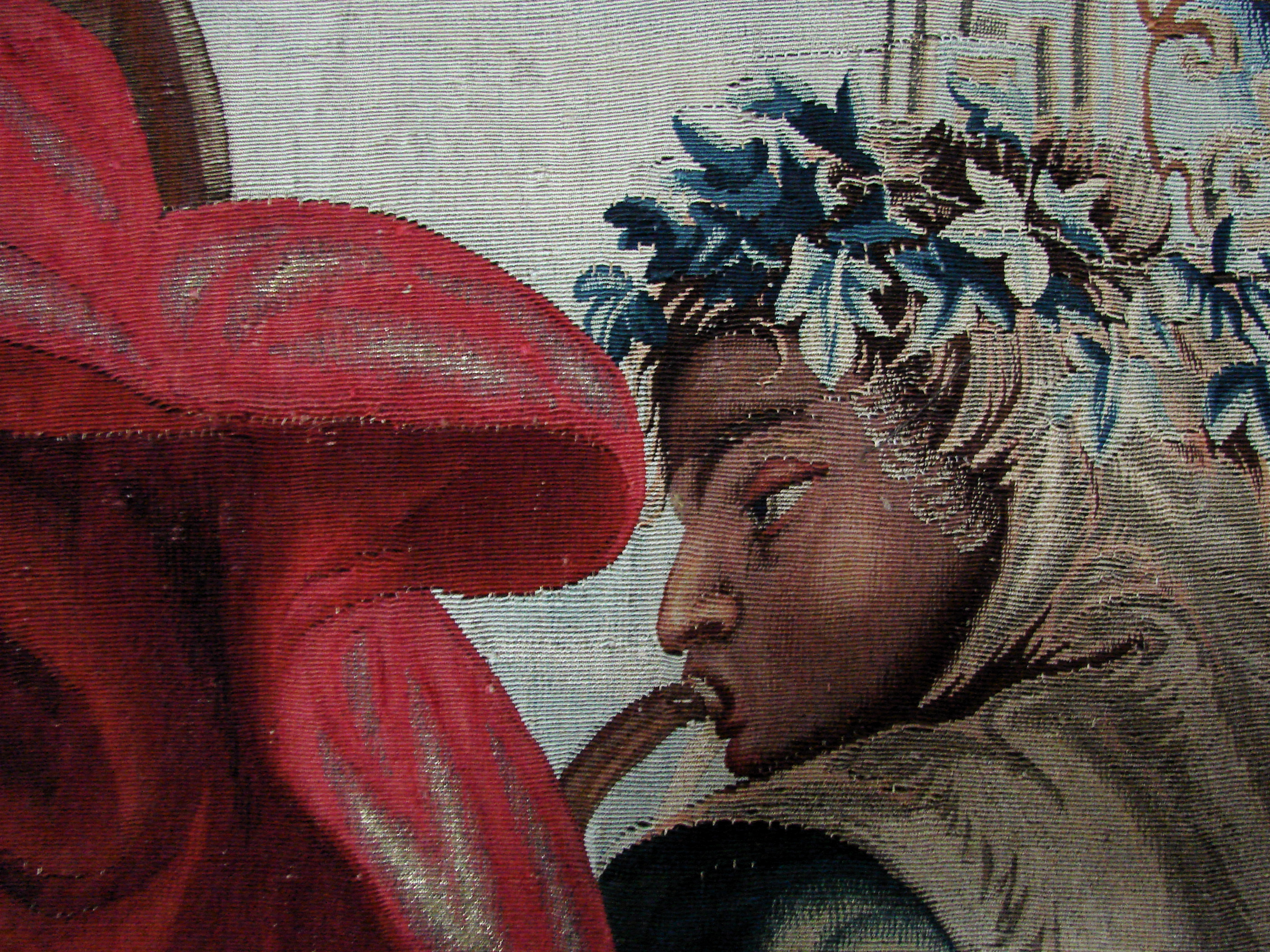 Detalje fra gobelin på Frederiksborgmuseet, Sjælland